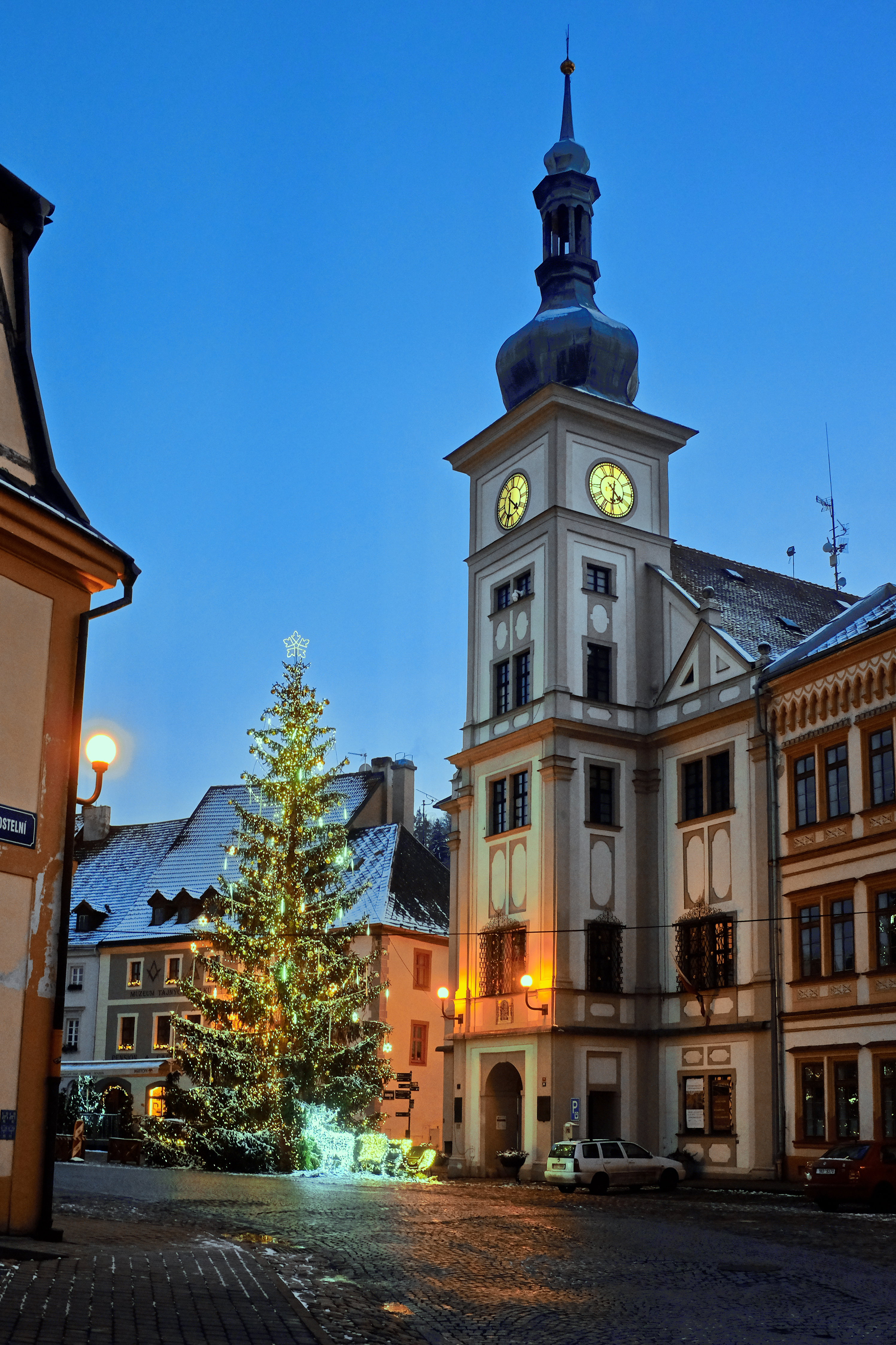 Radnice, T. G. Masaryka 1/69, Loket (okres Sokolov).